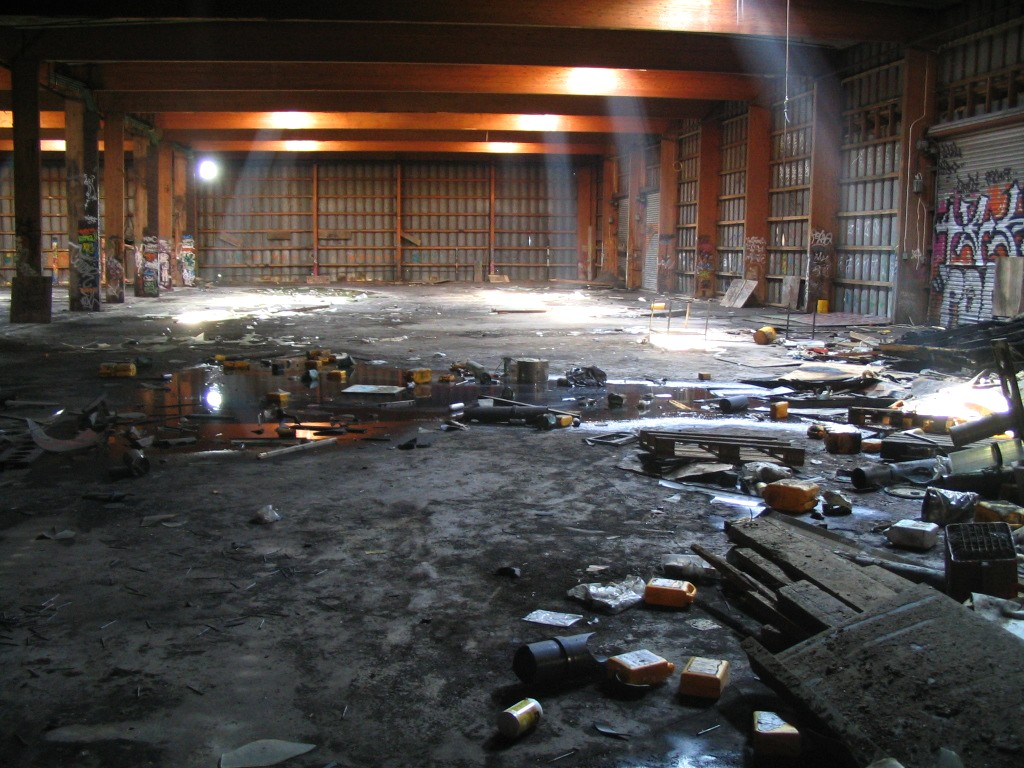 Turun Raunistulan rehutehtaan varasto, joka tuhoutui kesällä 2005 suuressa halliin varastoidun jätepaperin tulipalossa.